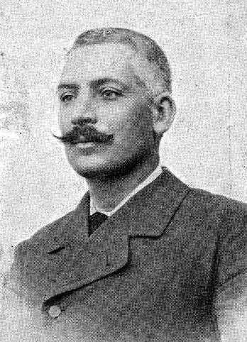 Perfecto Feijoo Poncet, fotografía en Vida Gallega 1909